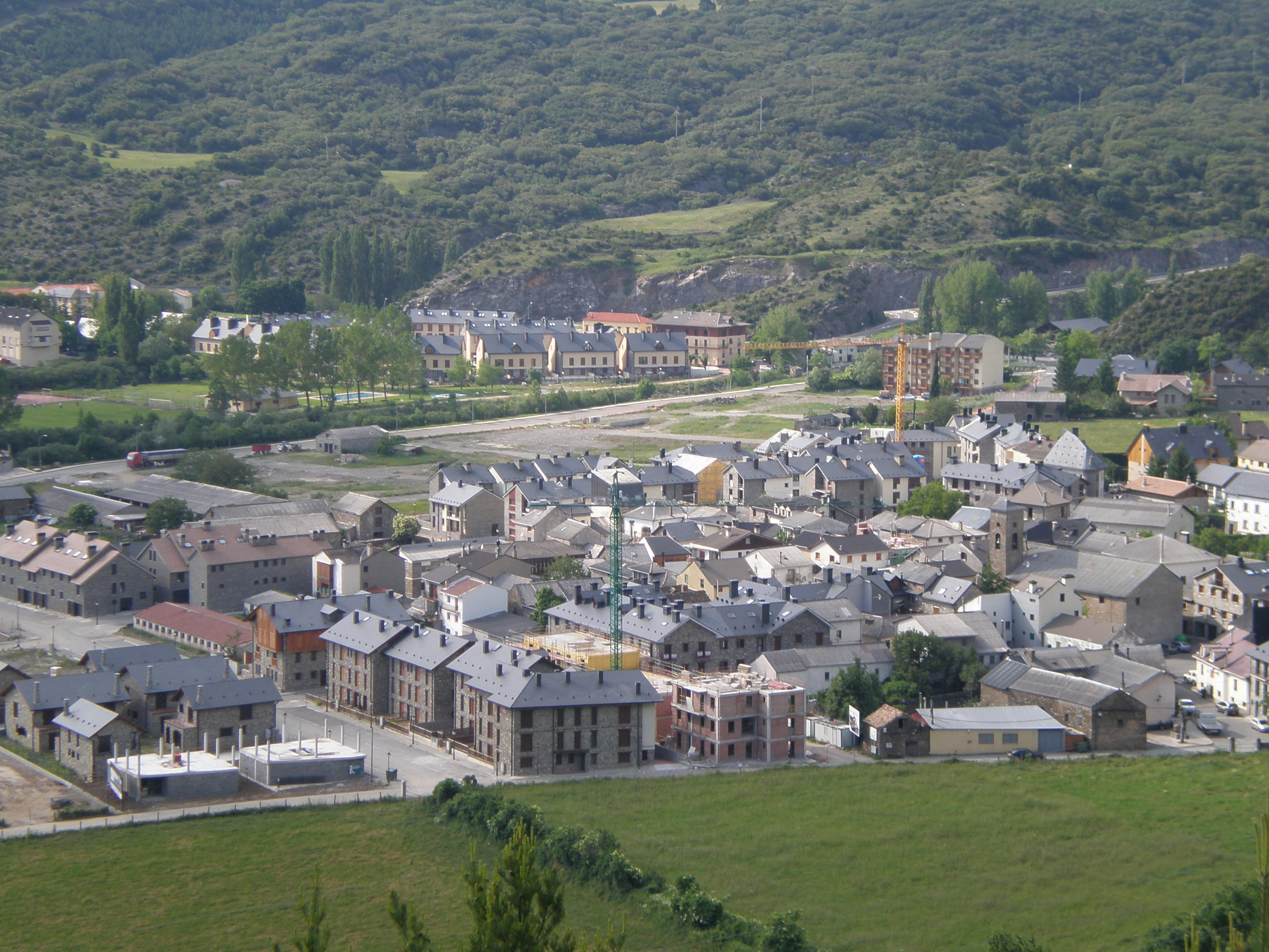 Casco viejo de Villanúa en torno a la iglesia de San Esteban